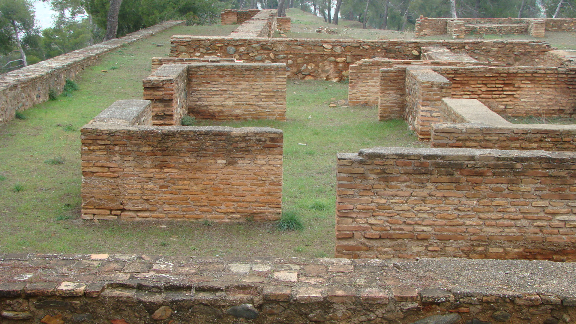 Vista de las ruinas del palacio de dar al-Arusa